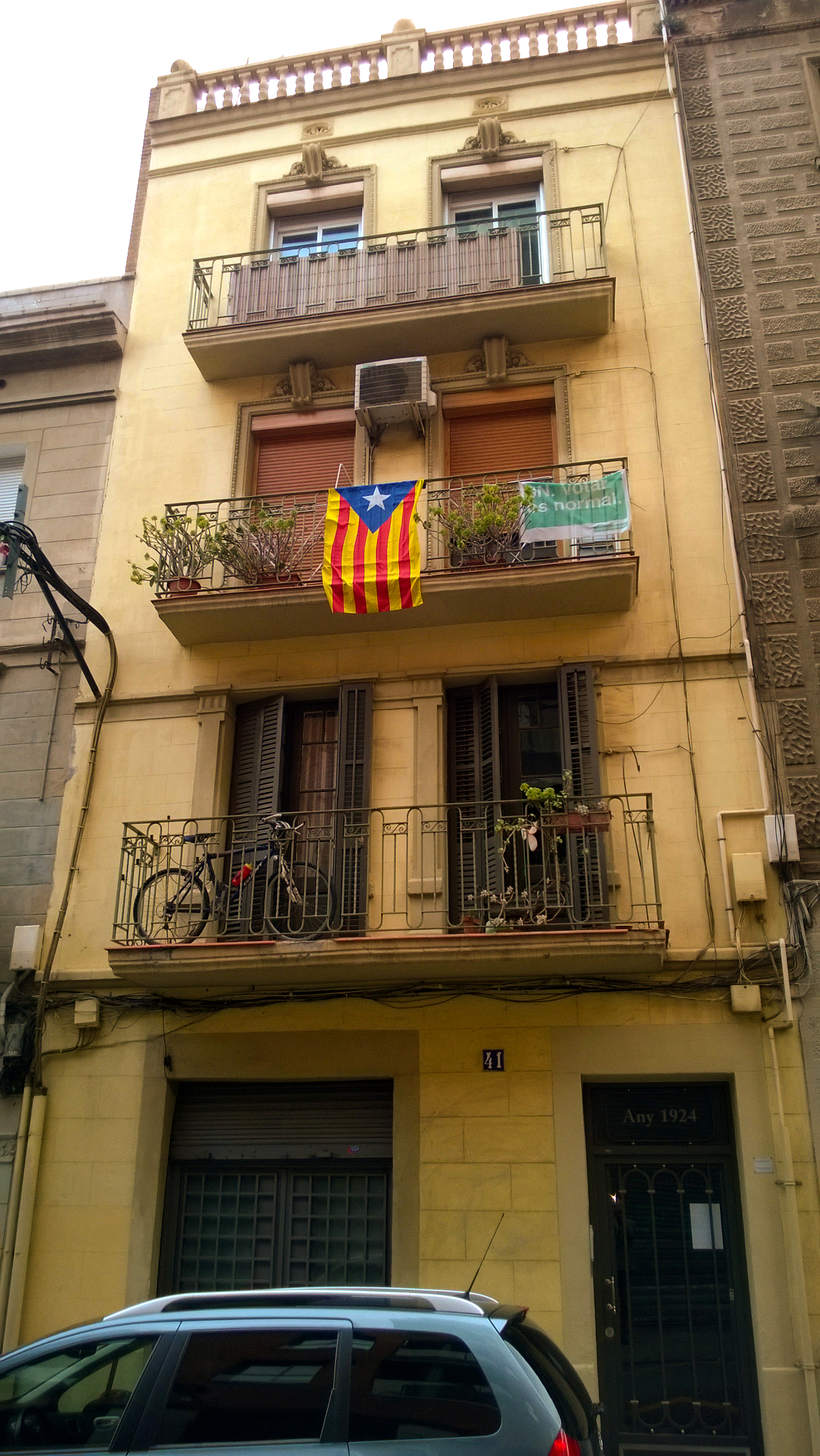 Modest Feu. Casa Joaquim Teixidó c/ Jaume Roig, 41 (obra conjunta con el arquitecto Adolf Florensa i Ferrer)